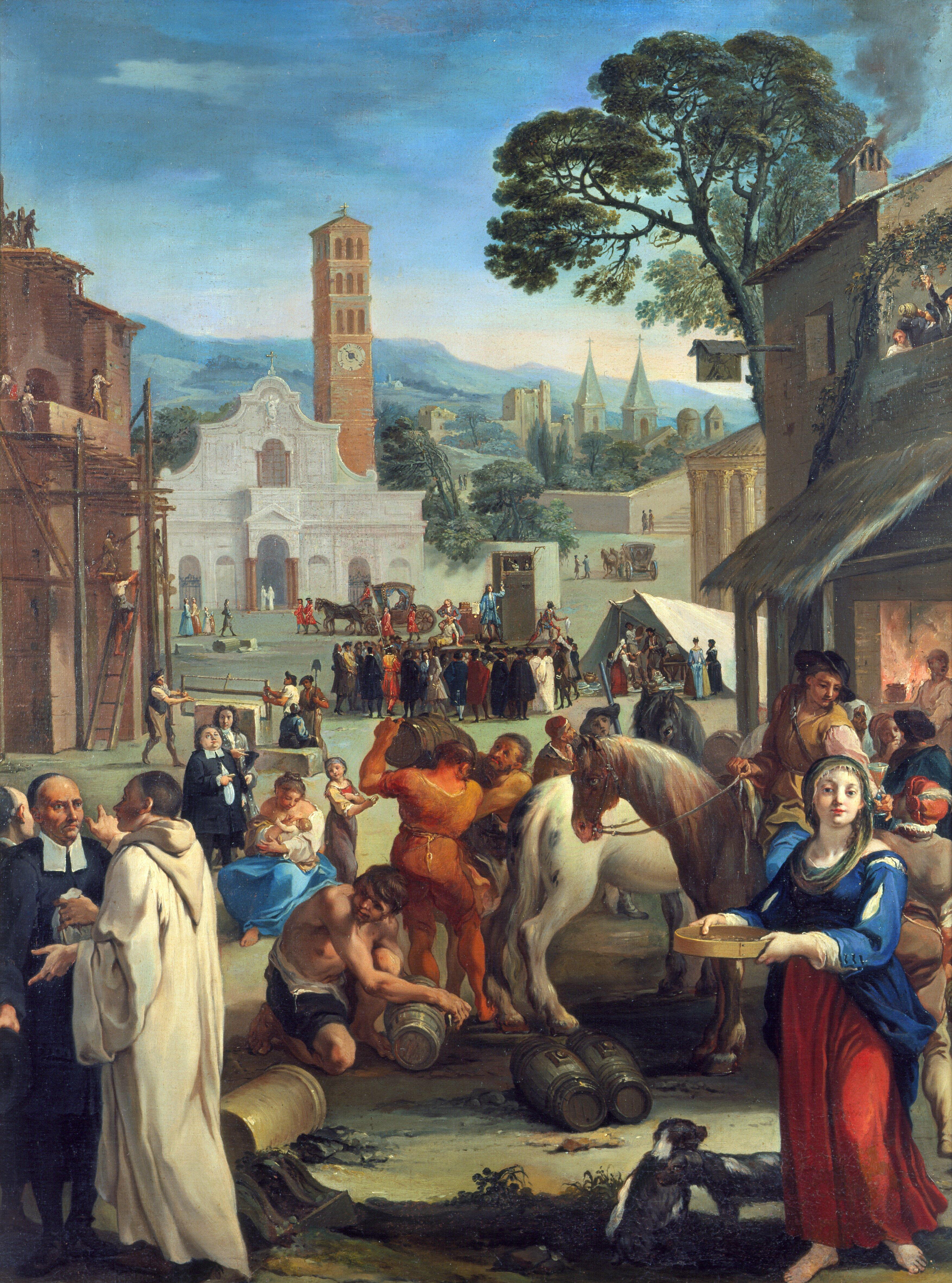 El Mercado